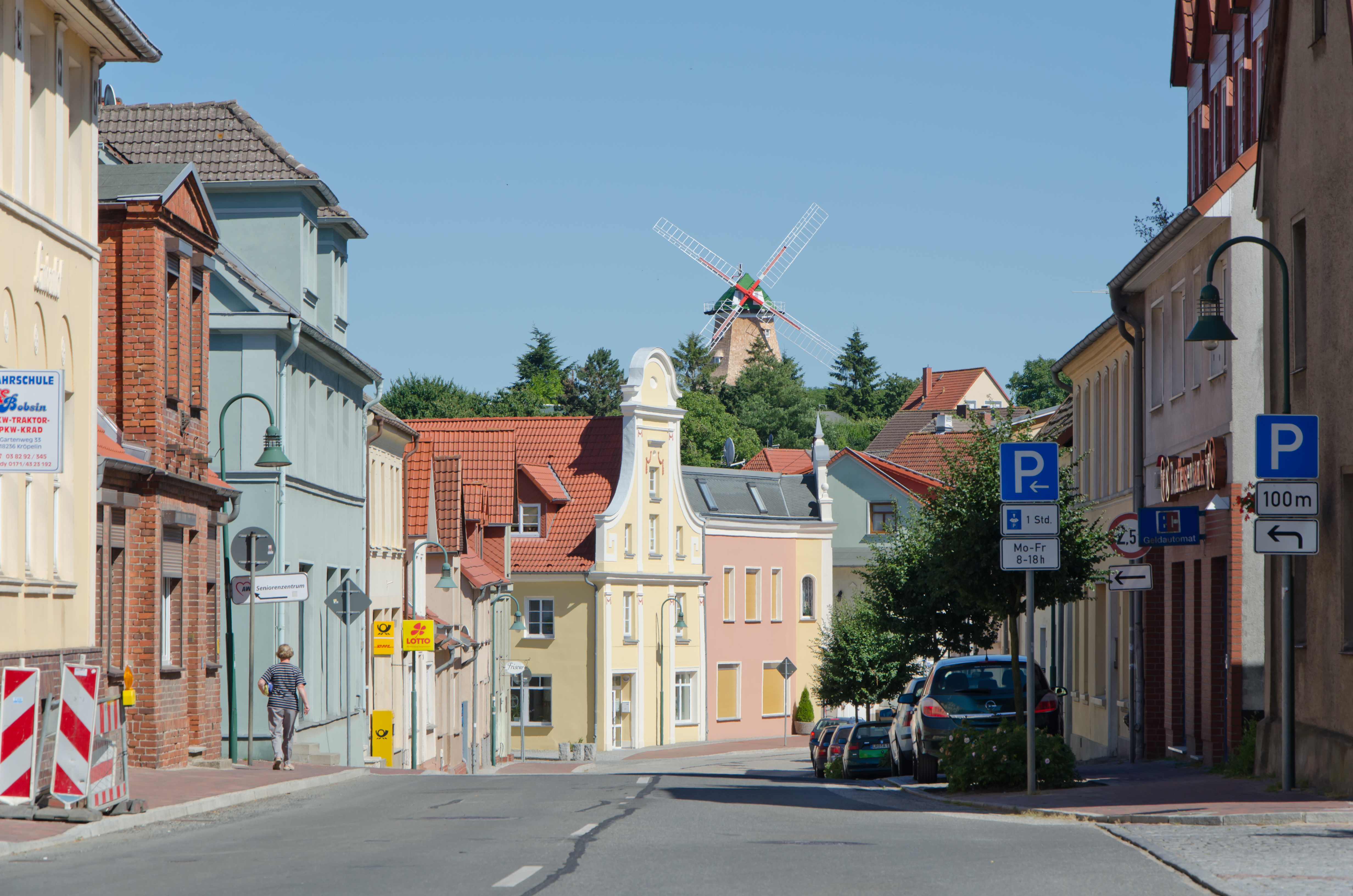 Kröpelin Blick vom Markt auf die Mühle